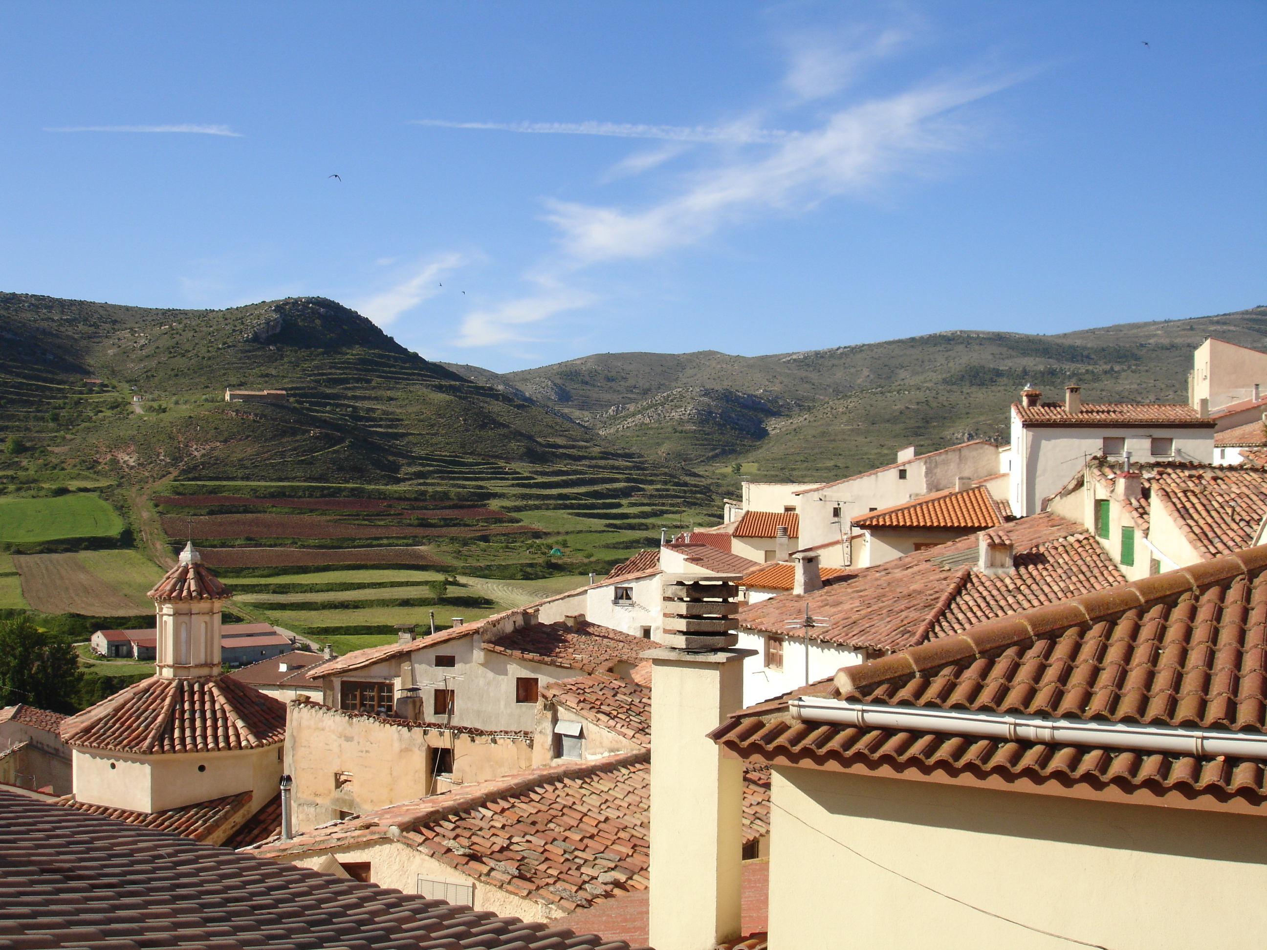 Exulb (Andorra-Sierra de Arcos, Teruel, Aragón)